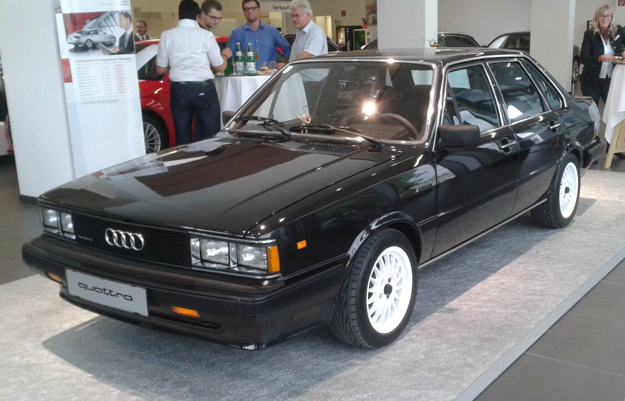 Exportmodell BJ. 1984 Typ85